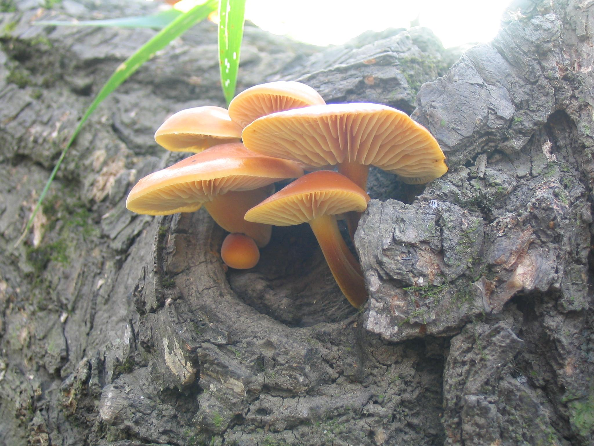 Fungi in forest